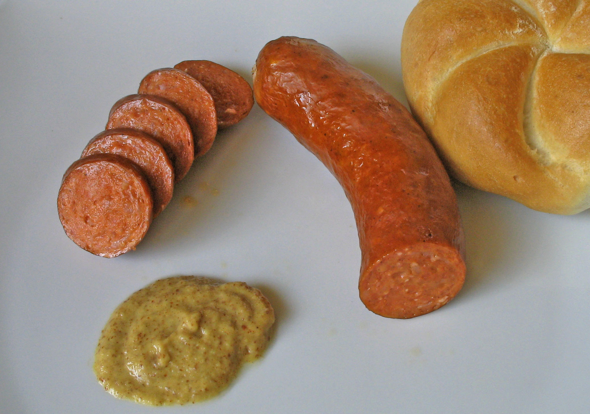 Burenwurst (Austrian sausages) mit süßem Senf und Kaisersemmel.